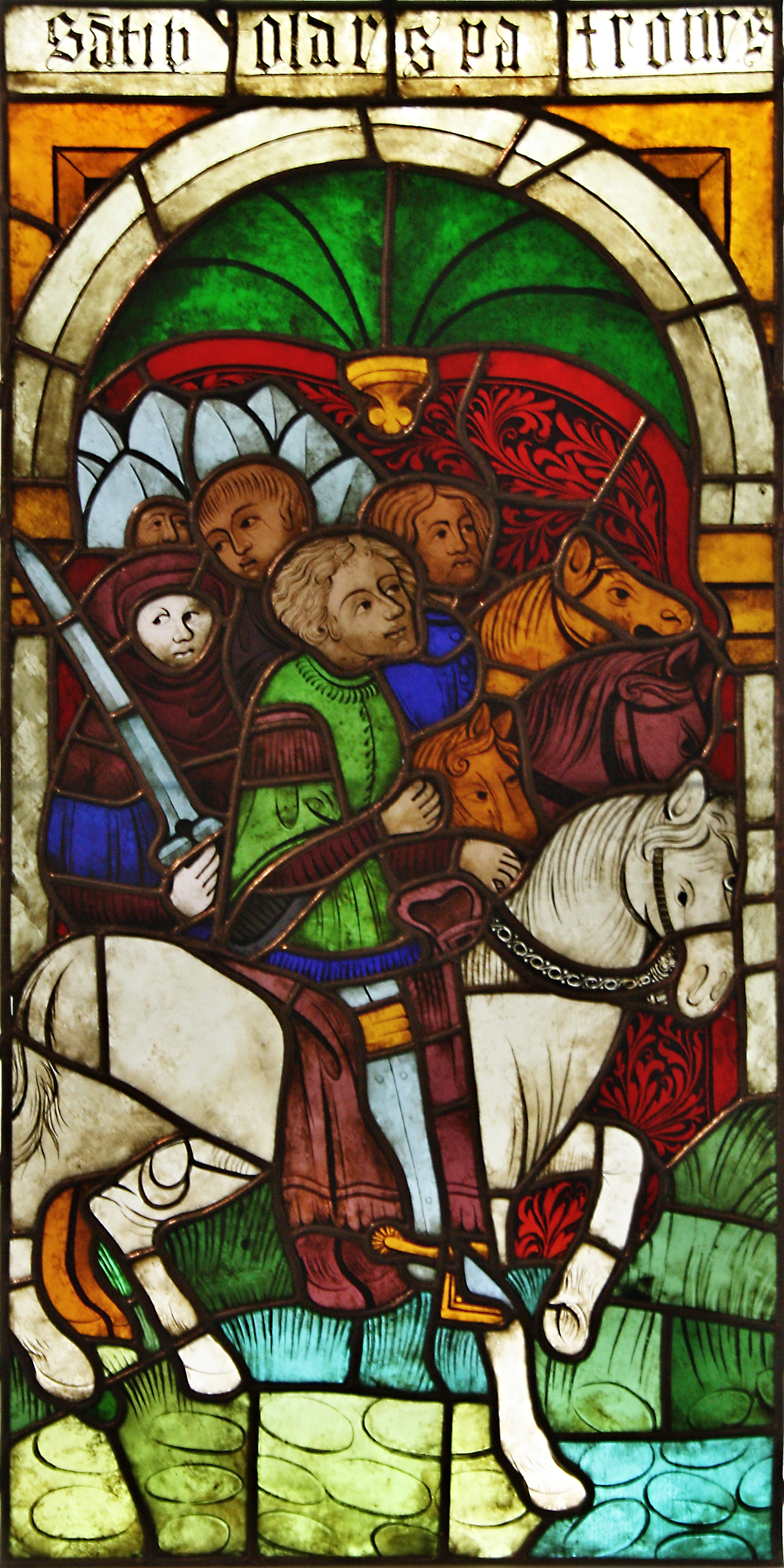 Vitráž